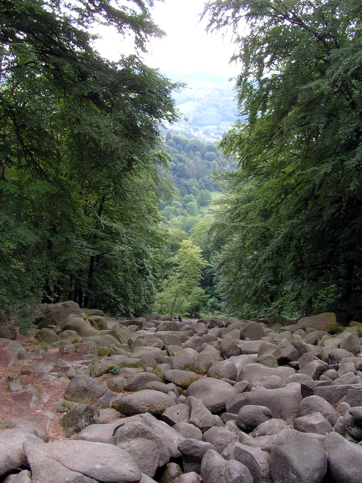 Das Felsenmeer im hessischen Reichenbach, Blick nach unten, Lautertal, Oderwald